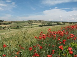 L'Ametlla de Segarra es una de las poblaciones integradas en el municipio de Montoliu de Segarra perteciente a la comarca de la Segarra en la provincia catalana de Lérida en España.